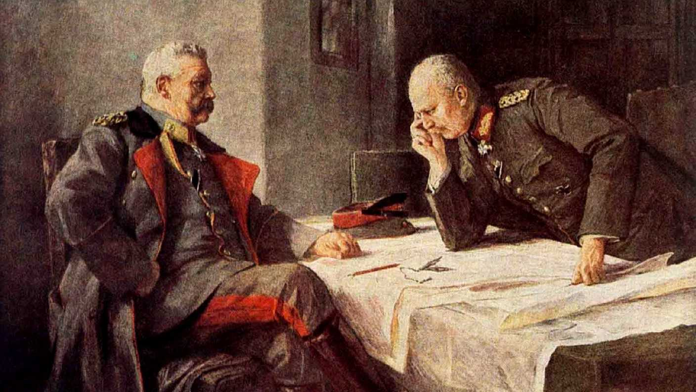 Paul von Hindenburg (left) and Erich Ludendorff. Painting by Professor Hugo Vogel.